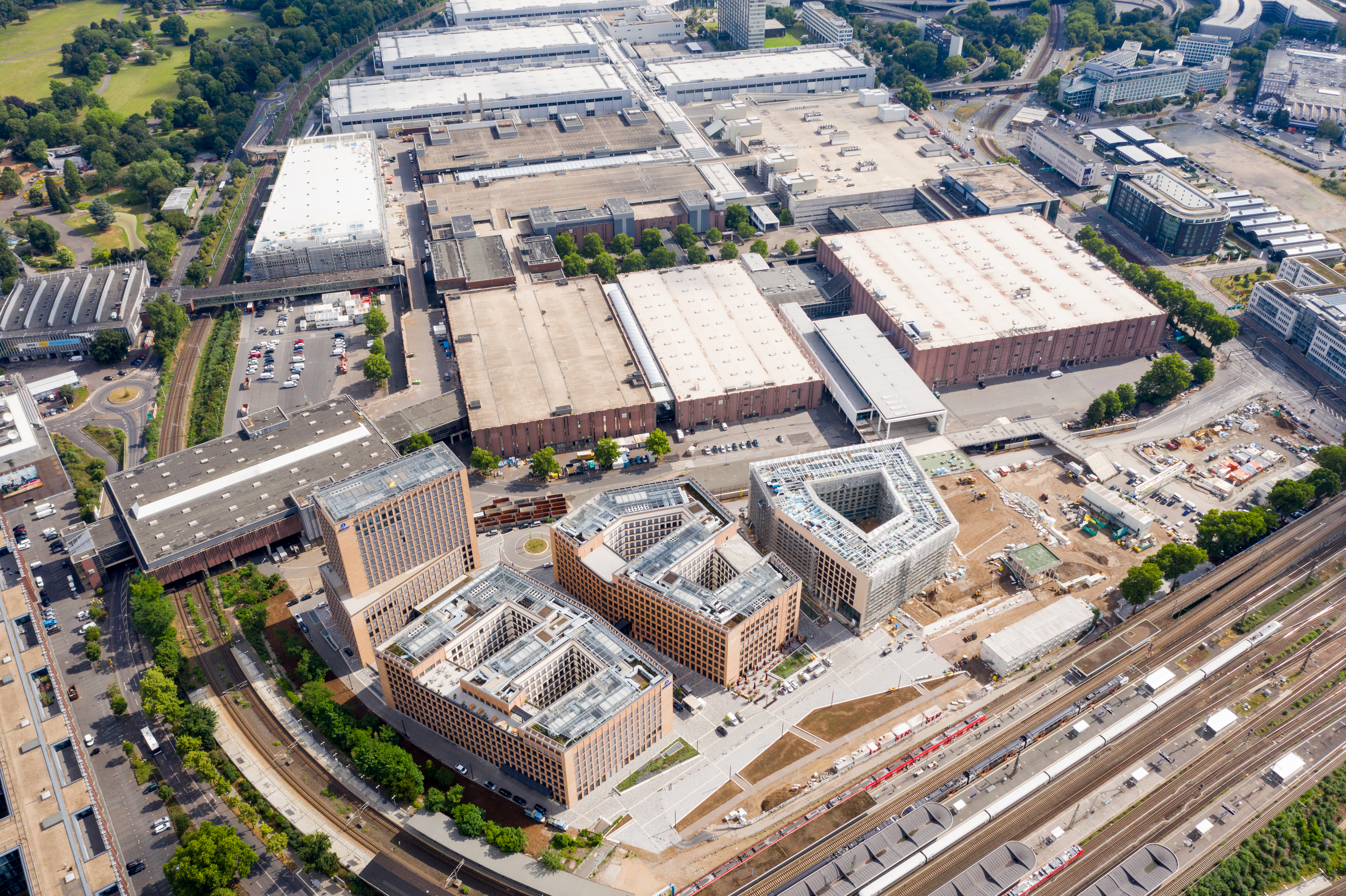 MesseCity Köln, Messehallen der Koelnmesse. Unten rechts im Anschnitt der Bahnhof Köln-Deutz - Luftaufnahme